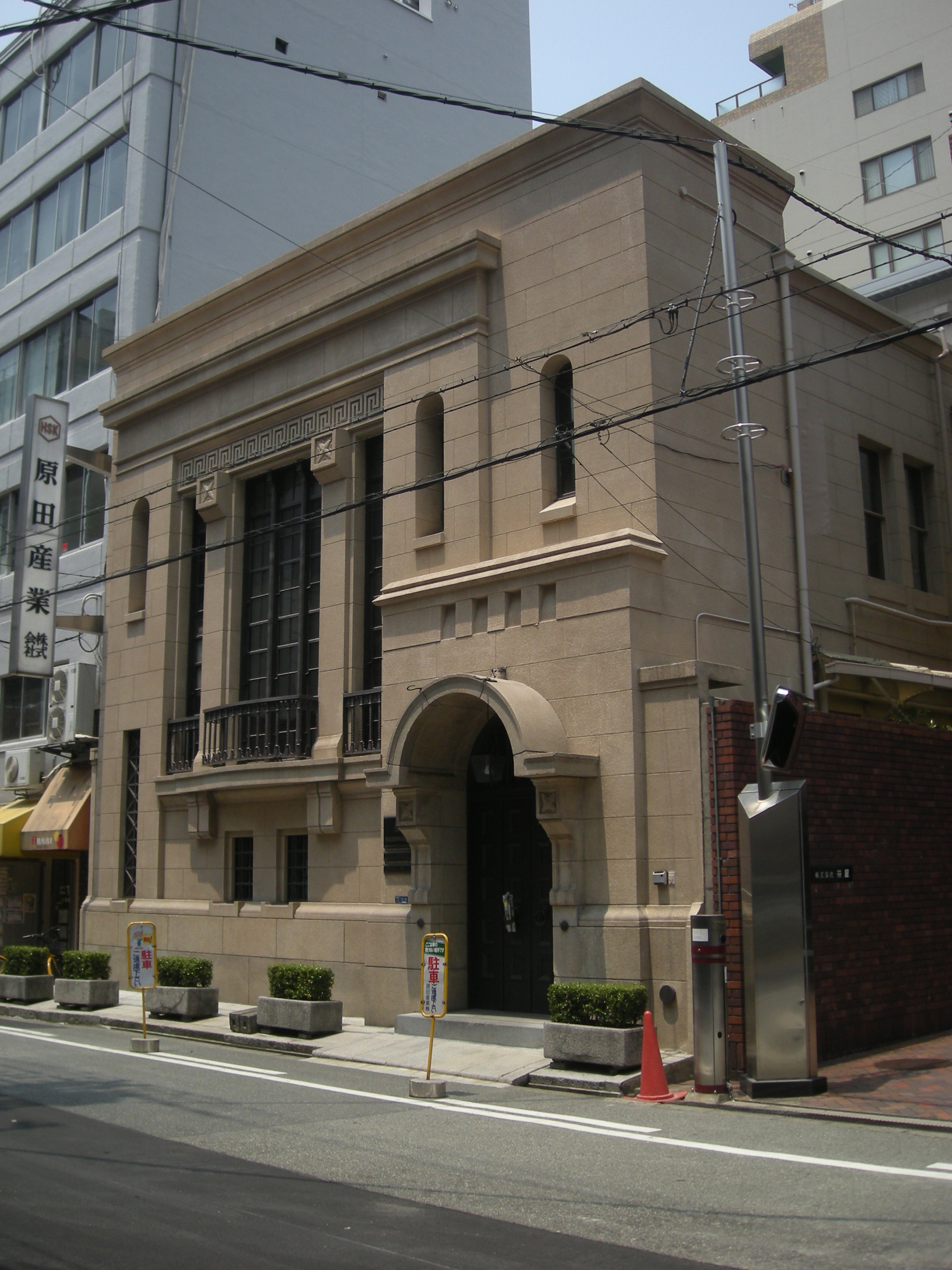 原田産業株式会社Unknown